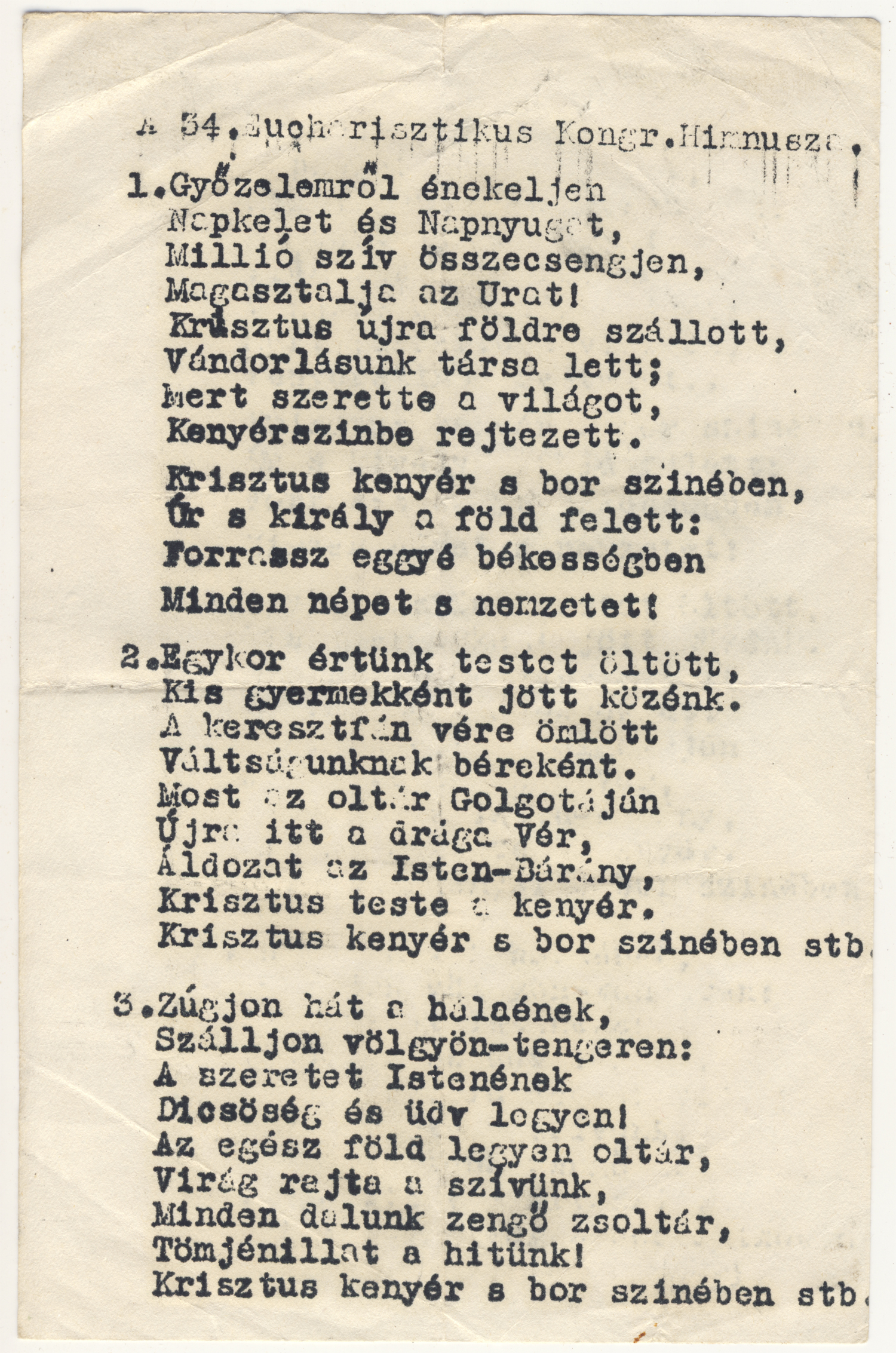 A 34. Eucharisztikus világkongresszus himnusza